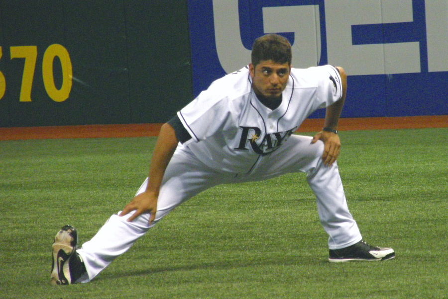 Matt Garza